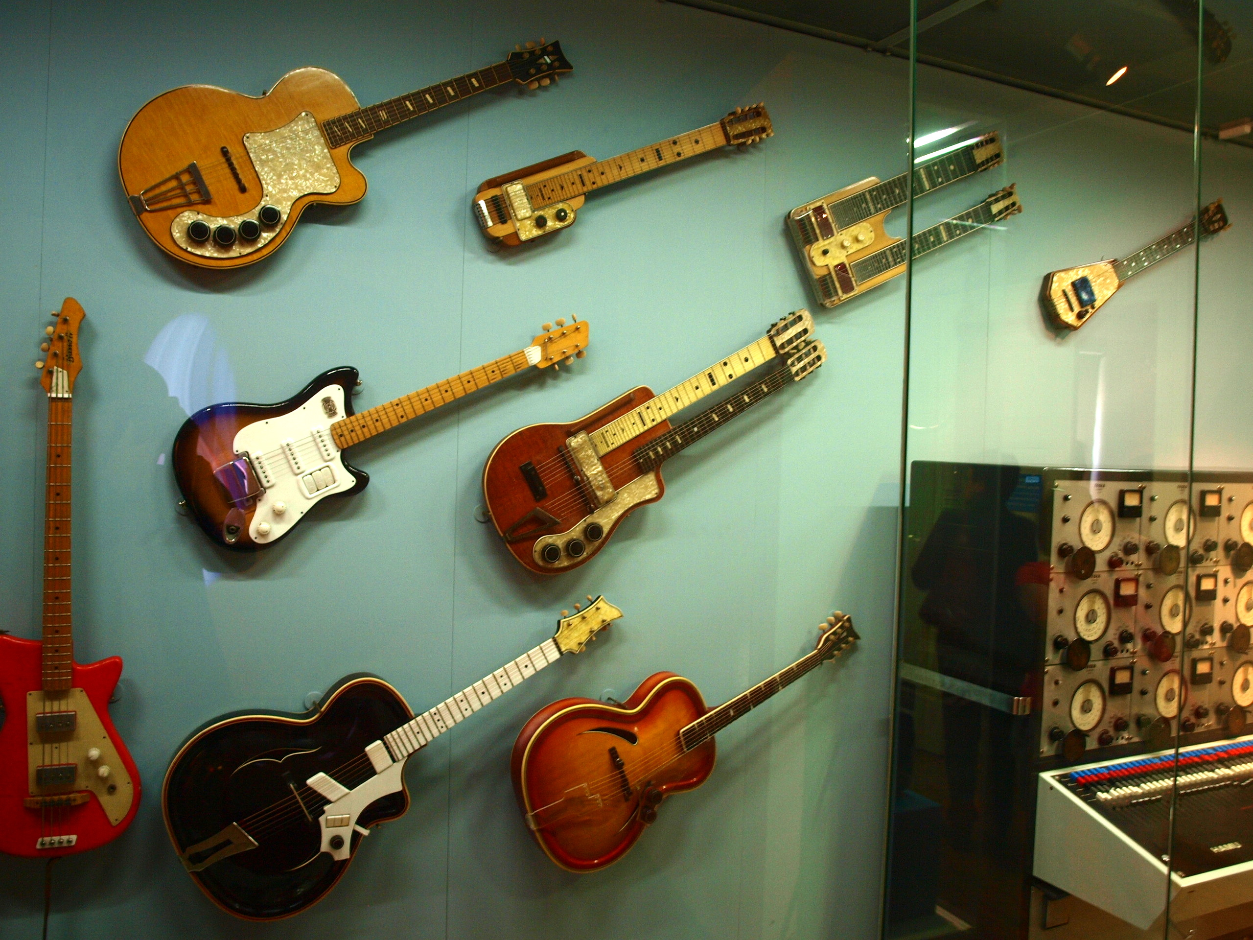 České muzeum hudby - chordofony, el. kytary left and center: various electric guitars. right bottom: VÚRT synthesizer/organ by Výzkumném Ústavu Rozhlasu a Televize [Czechoslovak Research Institute of Radio and Television], using twelve electronic oscillators by TESLA (brand).